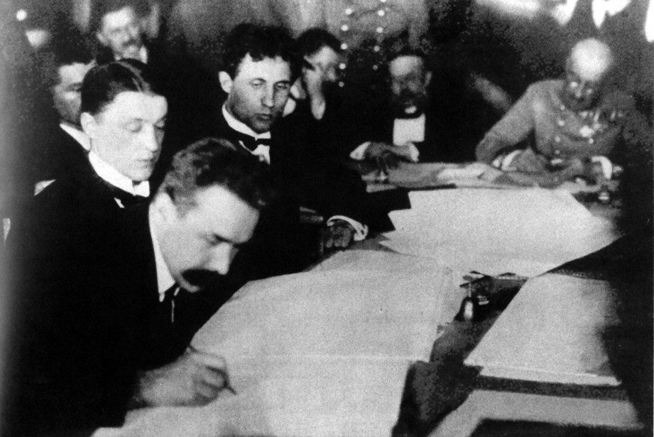 Левитский, Николай Григорьевич (1883-1939) подписывает Брестский мирный договор УНР с Центральными державами, 1918